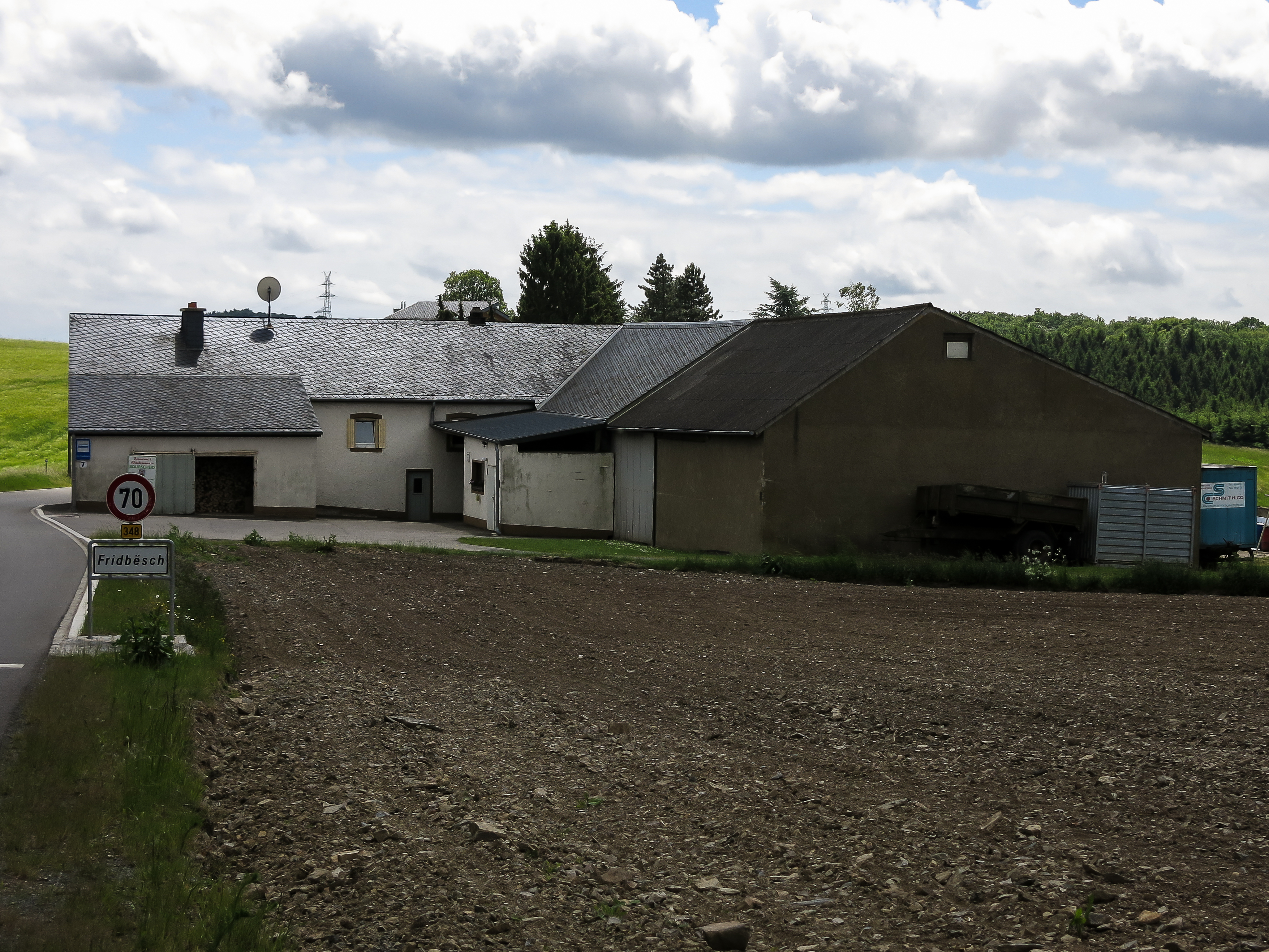 Fridbësch, Directioun Schlënnermanescht.